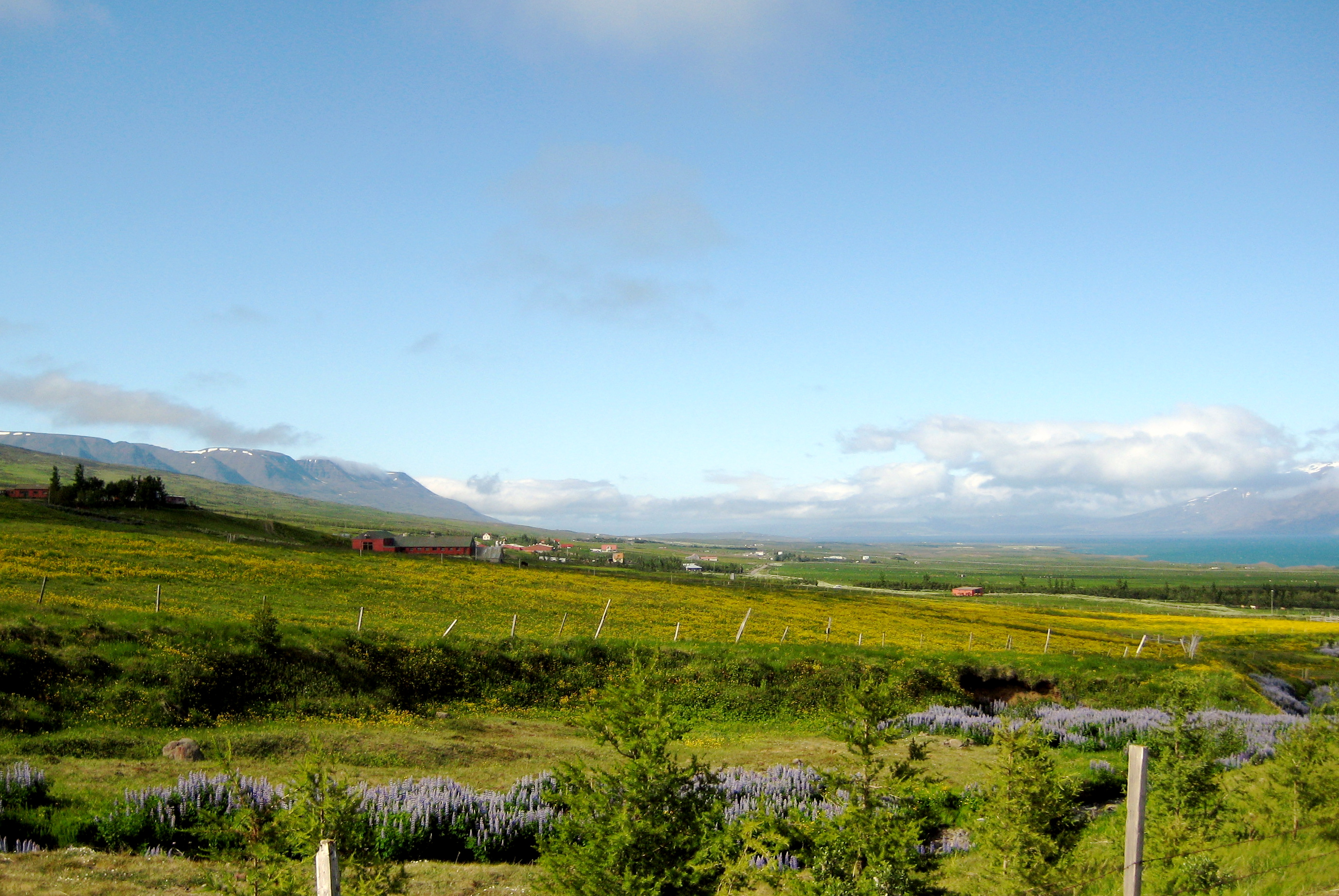 Kræklingahlíð in Eyjafjörður